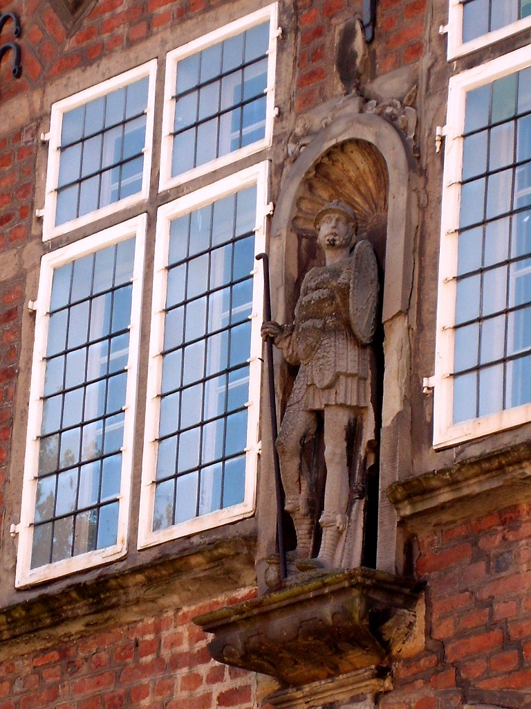 Skulptur des Kriegsgottes Mars in der Nordfassade des Zeughaus (Lübeck). Skulptur ist nach deutschem Urheberrecht gemeinfrei, da nach menschlichem Ermessen der Urheber zumindest im 19. Jahrhundert verstorben sein muß, hilfsweise gilt die . Original vom Schütting der Novgorodfahrer in Lübeck.